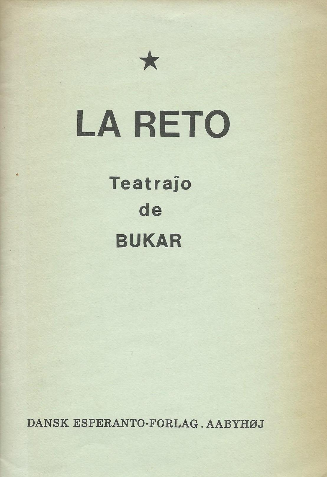 librokovrilo de "La Reto", 1971